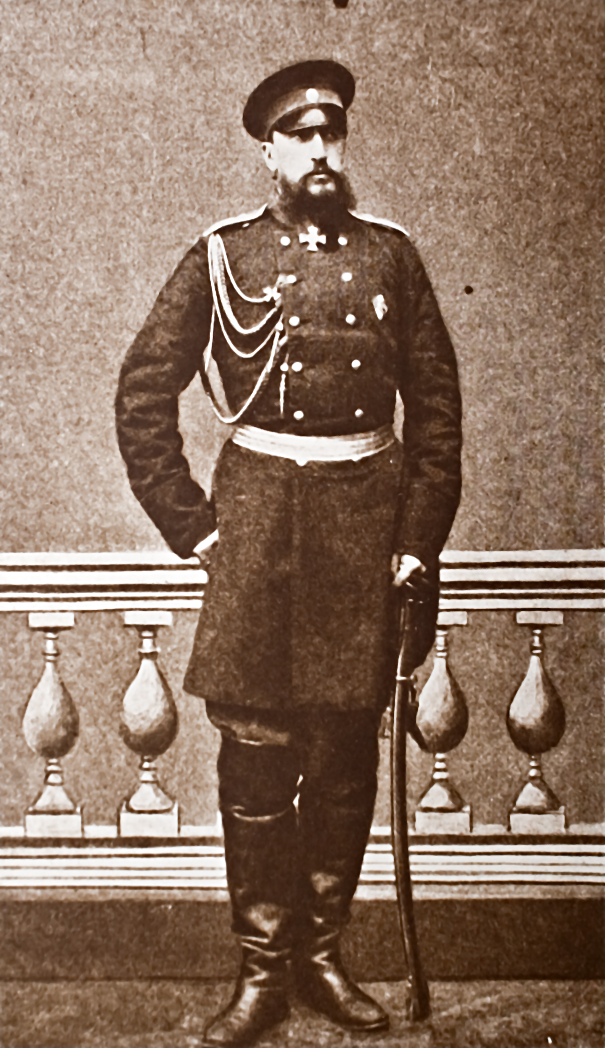 Великий князь Николай Николаевич Старший